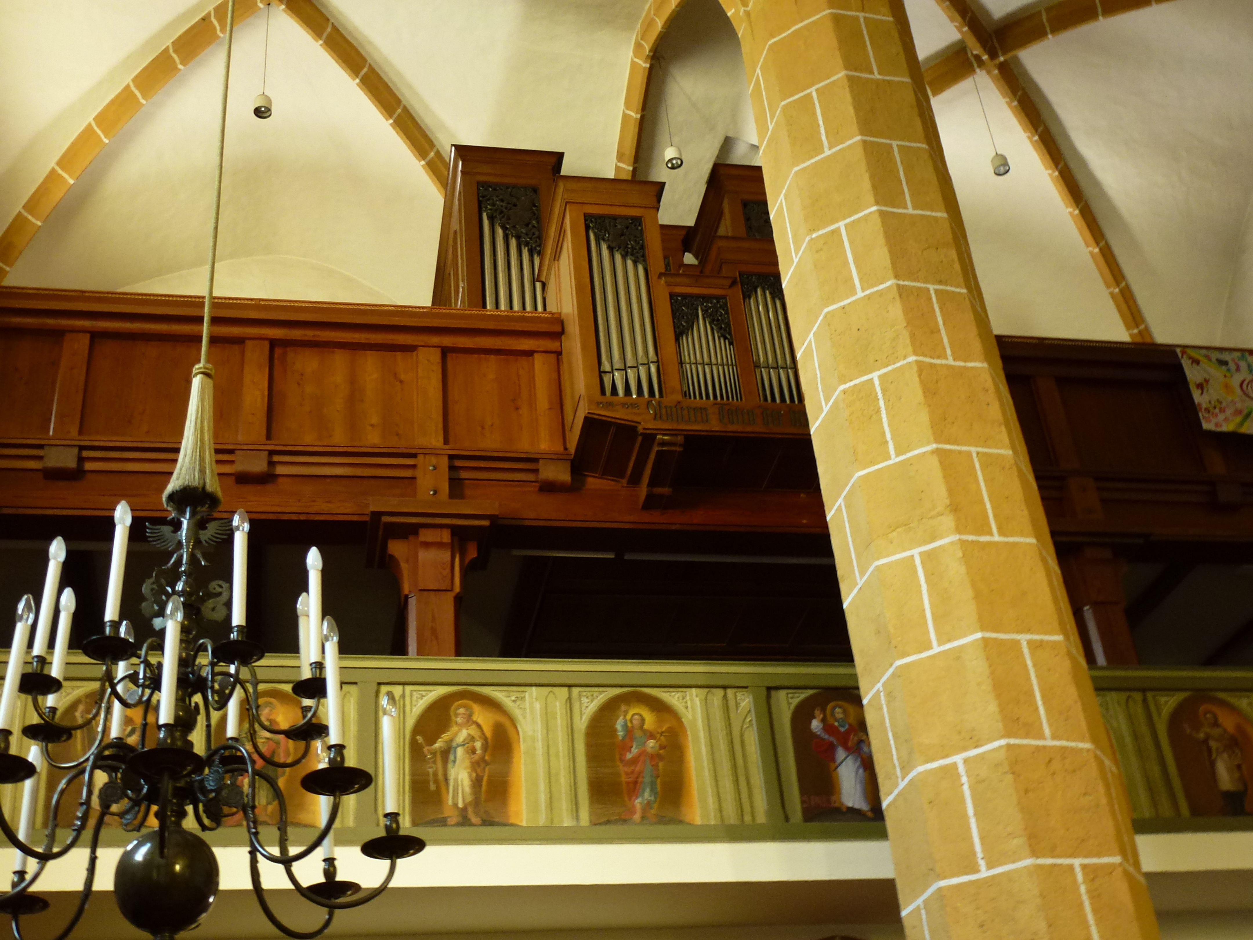 Kath. Pfarrkirche hl. Vitus, Orgel